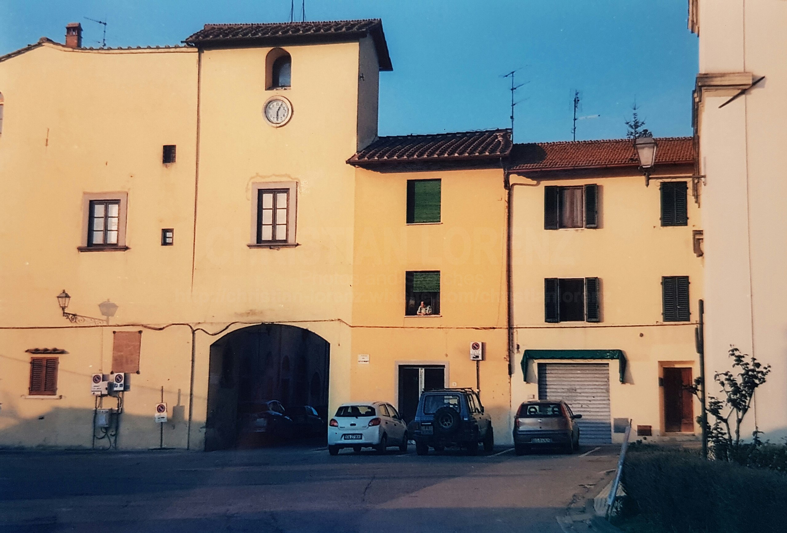 Porta di Galliano